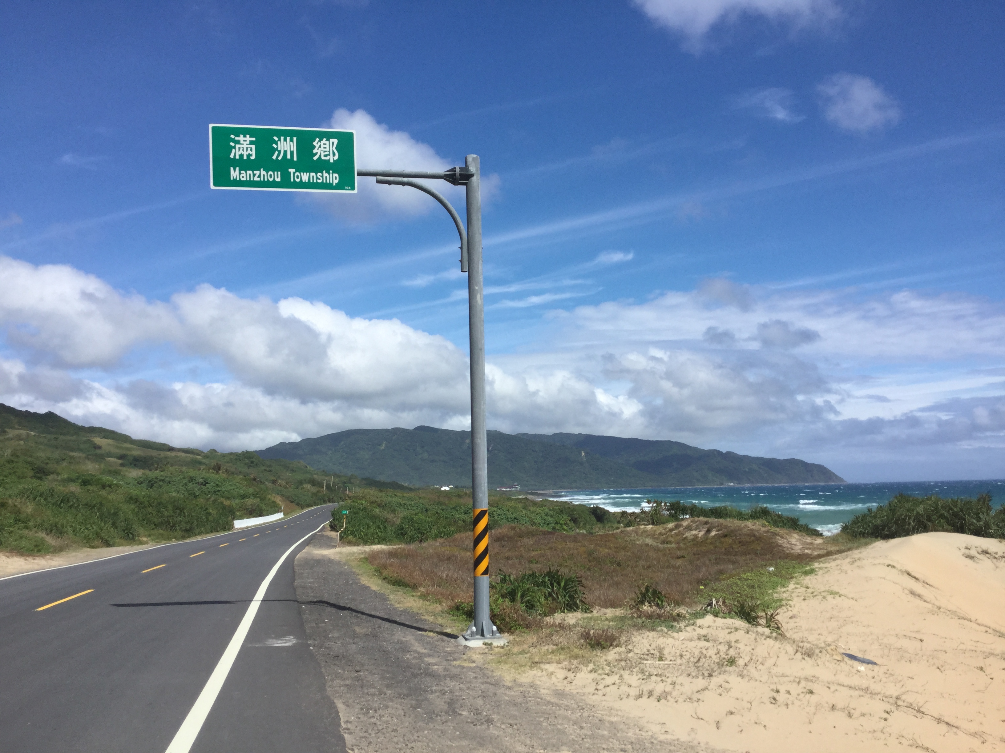 台26線於滿州鄉